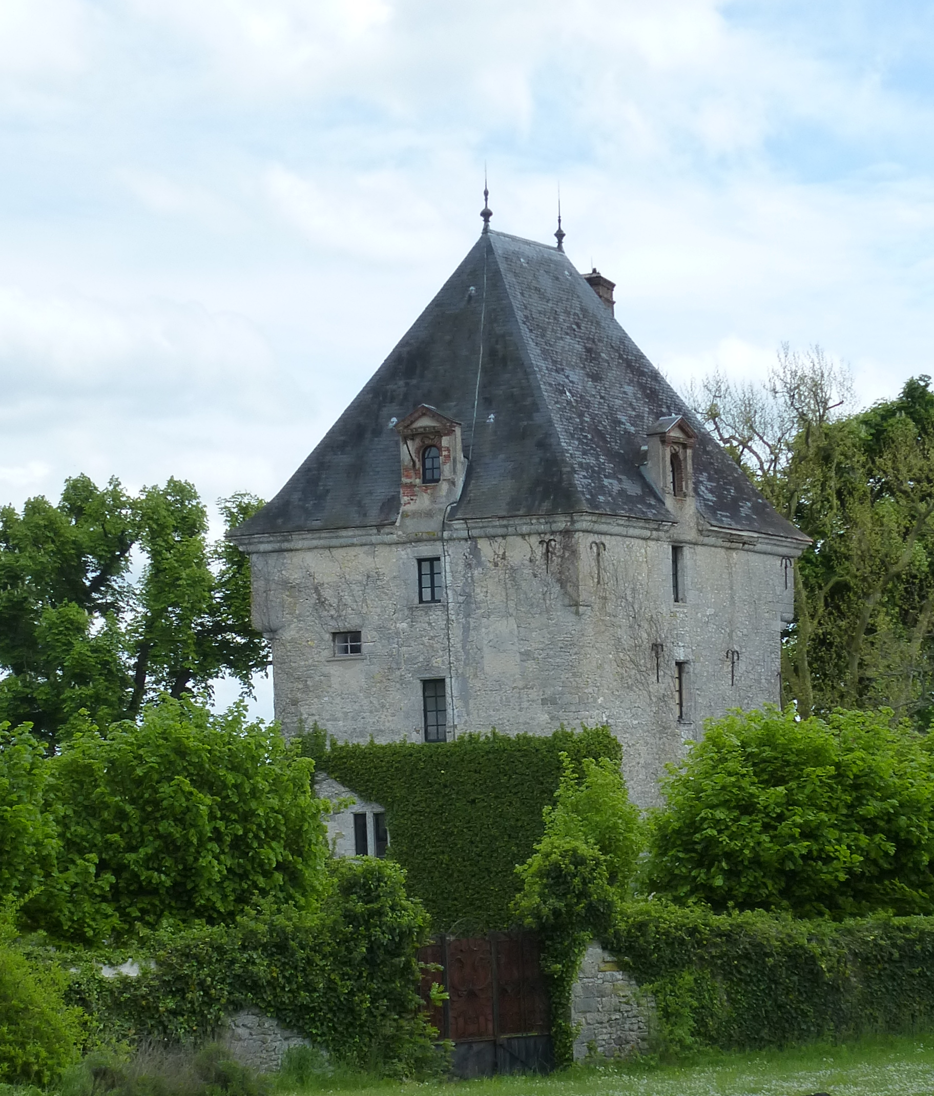 Tour dite Haute Maison. (Saint-Loup-de-Naud, département de la Seine et Marne, région Île-de-France).